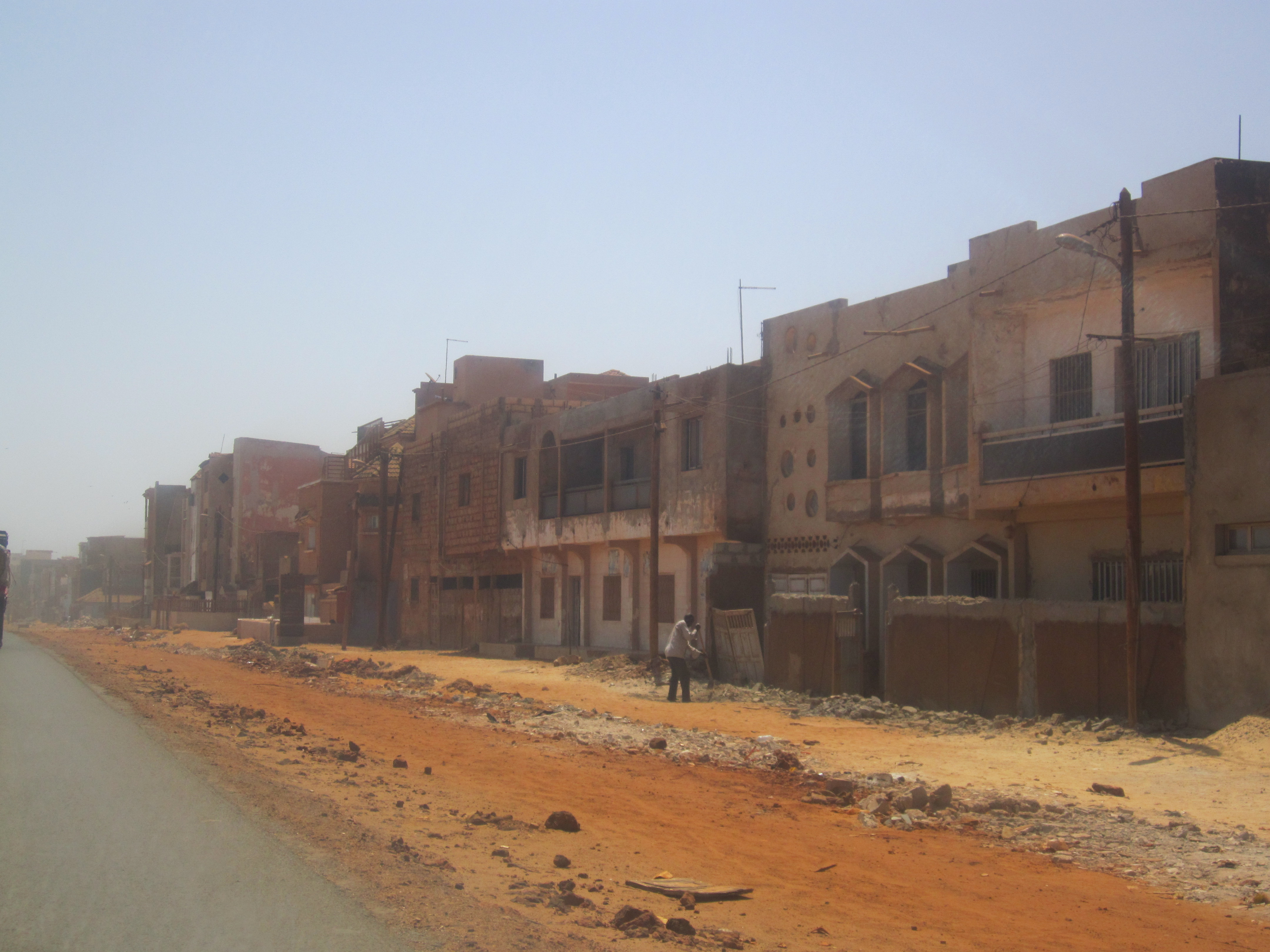 Une rangée d'habitation à la sortie de la ville de Dakar This is an image with the theme "Africa on the Move or Transport" from: Senegal